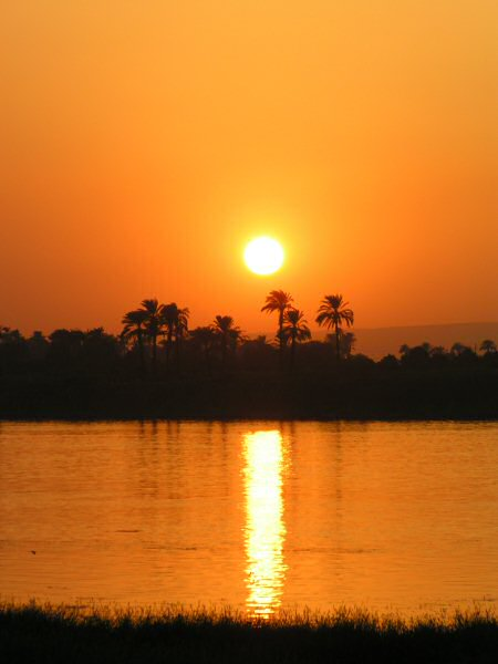 Description: Sonnenuntergang am Nil im ägyptischen Luxor, fotografiert von Martin Steiger am 10. Oktober 2003 und mit dessen Genehmigung unter GFDL zur Verfügung gestellt (Sunset over the Nile River in Egypt at Luxor). Source: German Wikipedia, original upload 7. Feb 2004 by Martin Steiger